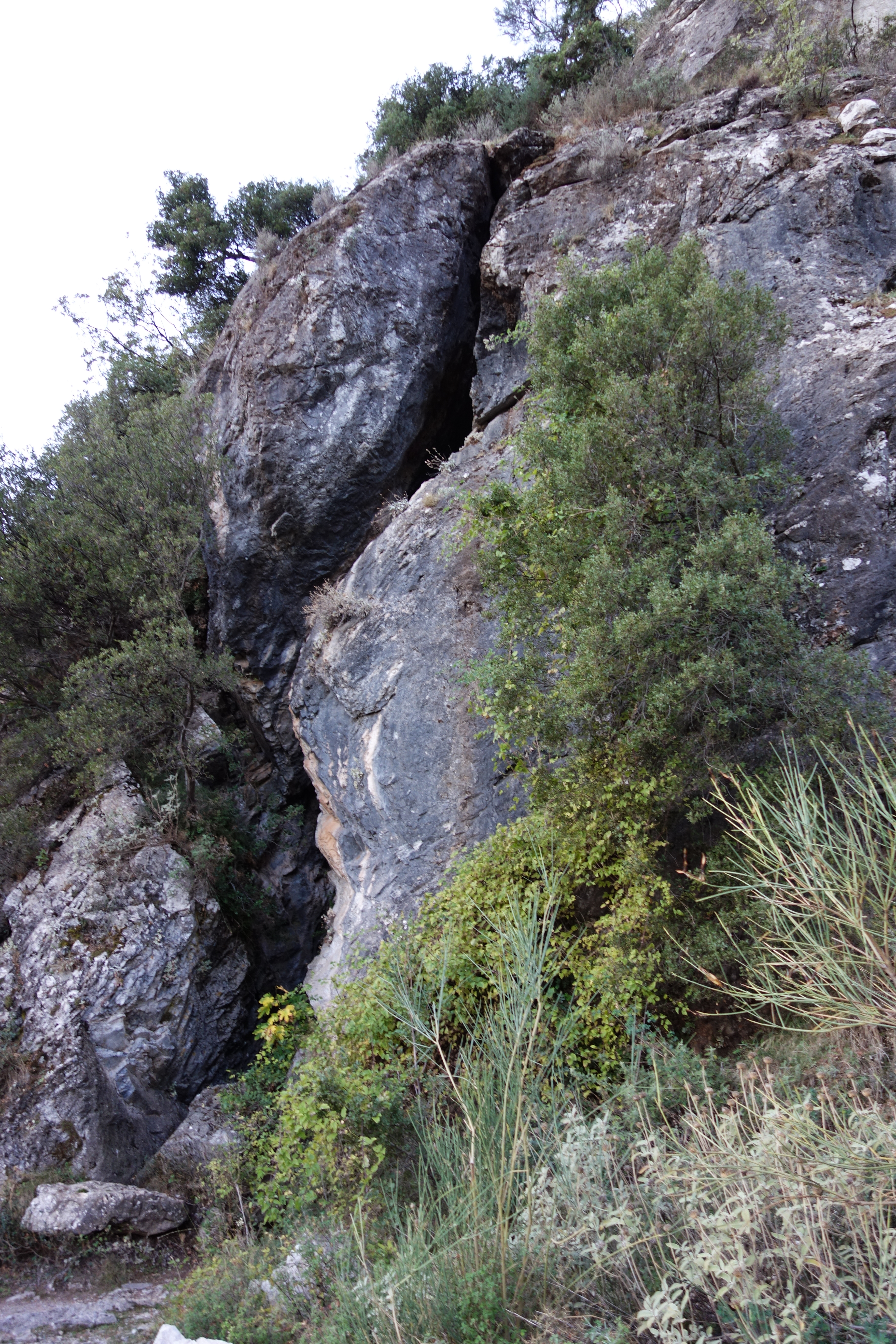 Σπήλαιο Καιάδας«Σπήλαιο Καιάδας»